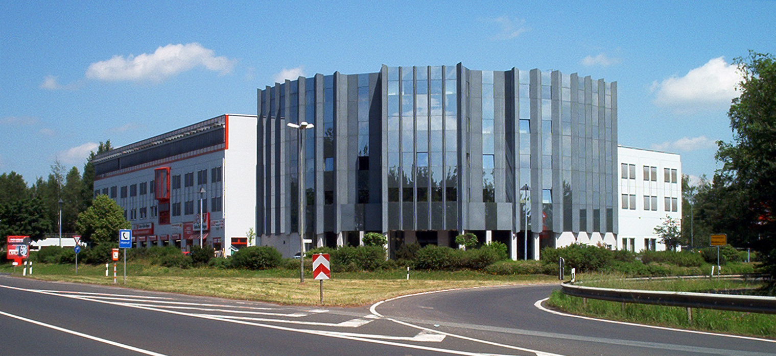 Auto Teile Unger im Norden von Weiden / Oberpfalz